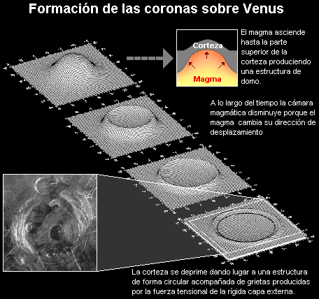 Fuente: The Face of Venus, libro sobre la geología de Venus publicado por la NASA en 1997. Descripción: formación de coronas sobre la superficie de Venus. Nota: la fotografía de radar (abajo, iquierda) corresponde a una imagen tomada por la sonda Magellan (Magallanes). La estructura tridimensional de las coronas fueron extraídas de la NASA. Autor: Lmb y NASA. Licencia de imagen: imagen cedida al dominio público.